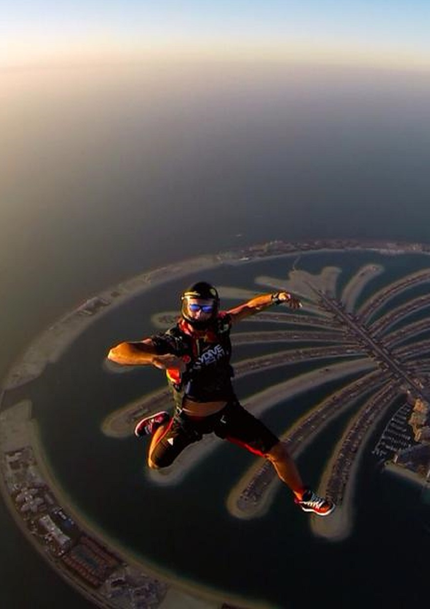 Добромир Славчев Skydive Dubai